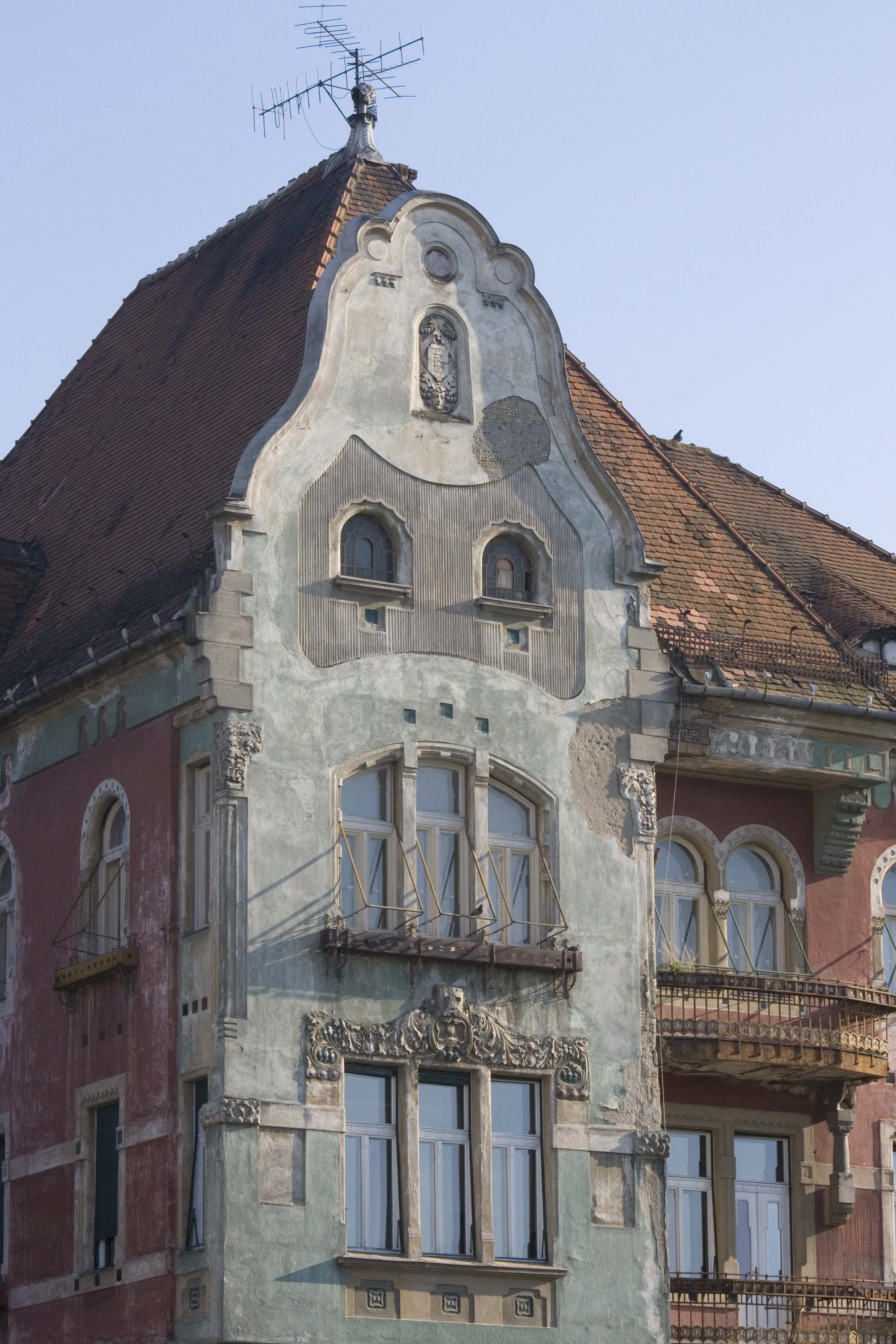 Piaţa Unirii din Timişoara